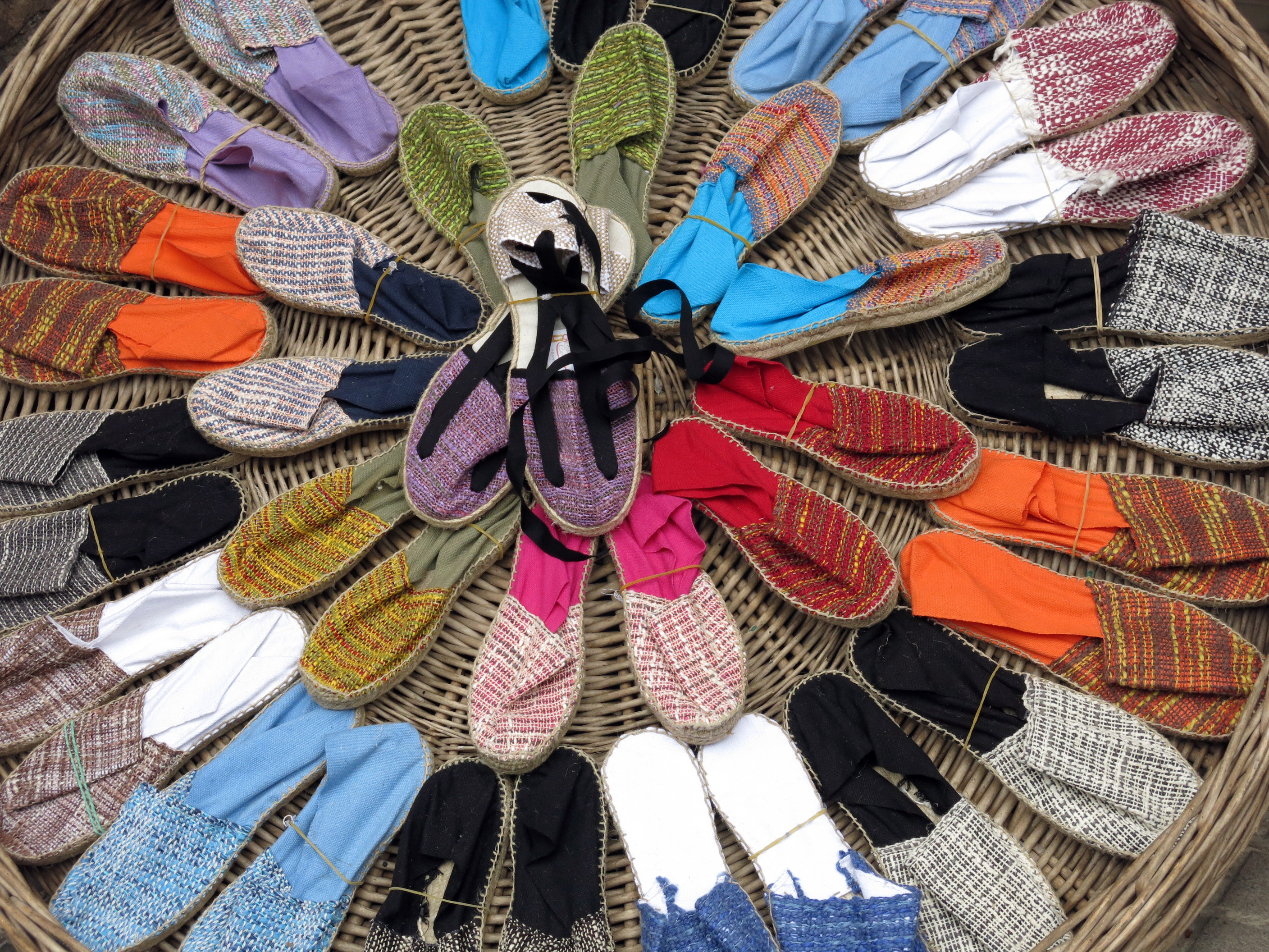 Espardenyes a la Fira Modernista de Terrassa, mercat artesà i d'alimentació a la pl. Freixa i Argemí